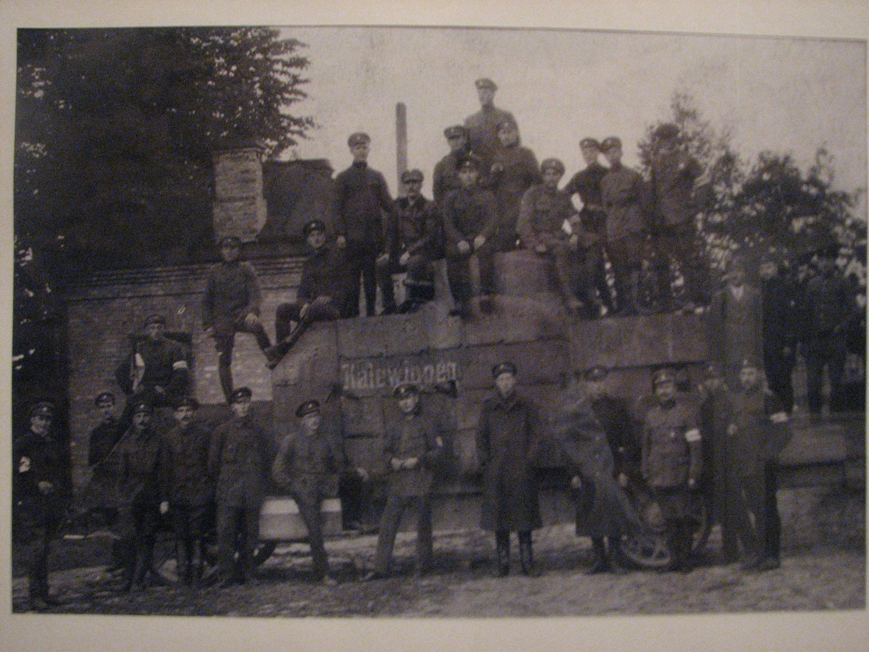 Soomusauto "Kalevipoeg" Valga Jaani kiriku juures.